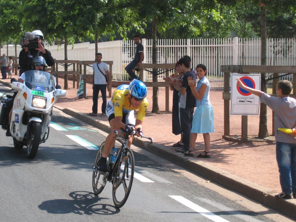 Lance rides past us in St Etienne